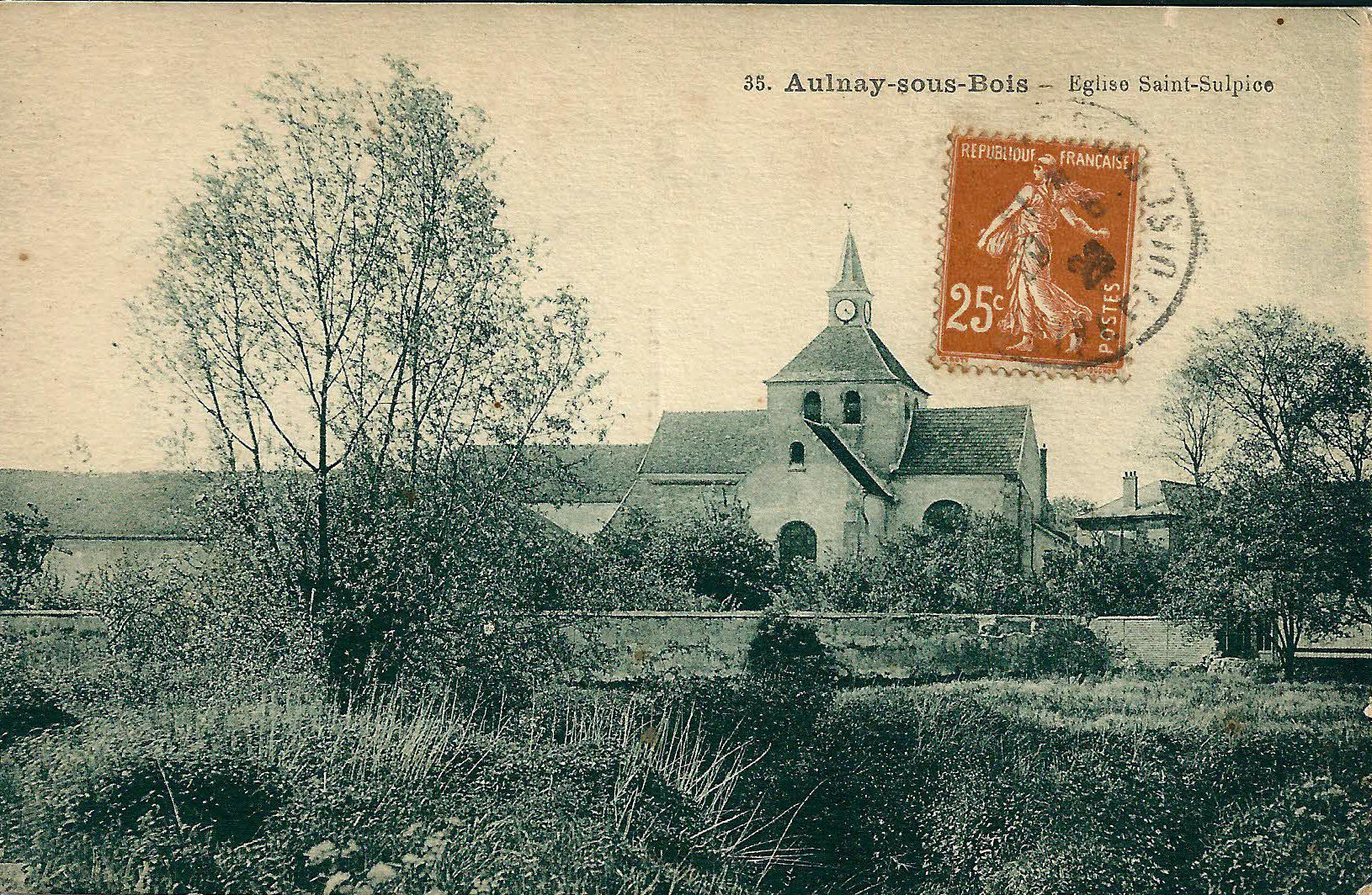 Aulnay-sous-Bois: Eglise Saint-Sulpice